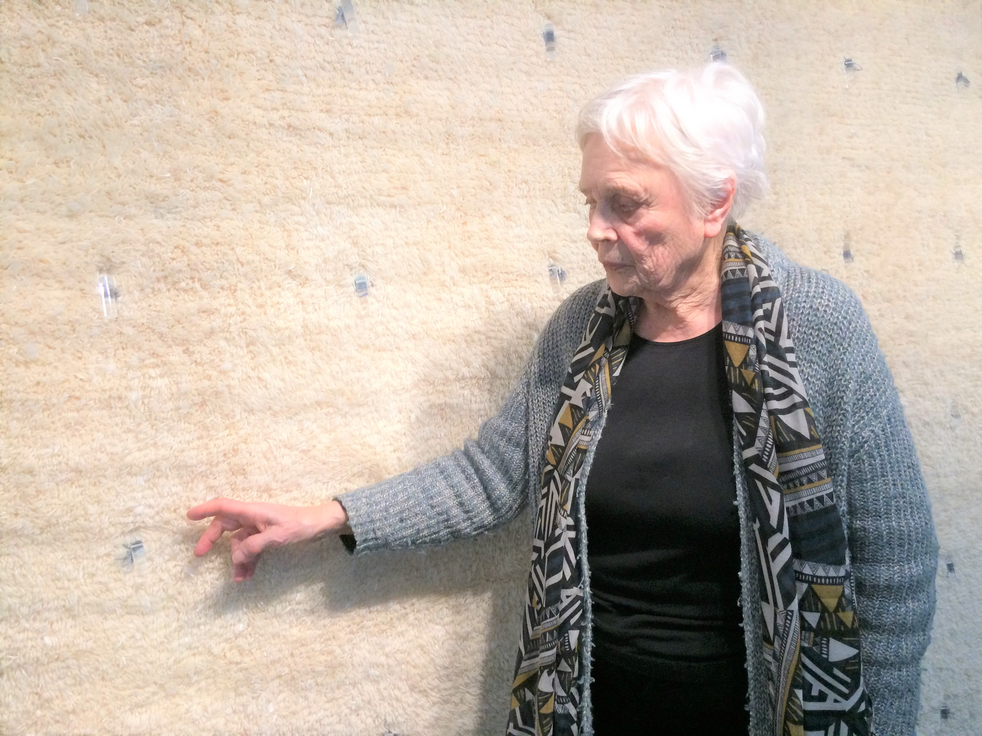 Maija Lavonen på Didrichsens konstmuseum i Helsingfors den 10 februari 2018, öppningsdagen av utställningen "Ahti och Maija Lavonen - i samklang" ("Yhteisiä ajatuksia", "In Harmony"), som pågår 10 februari - 13 maj, 2018.